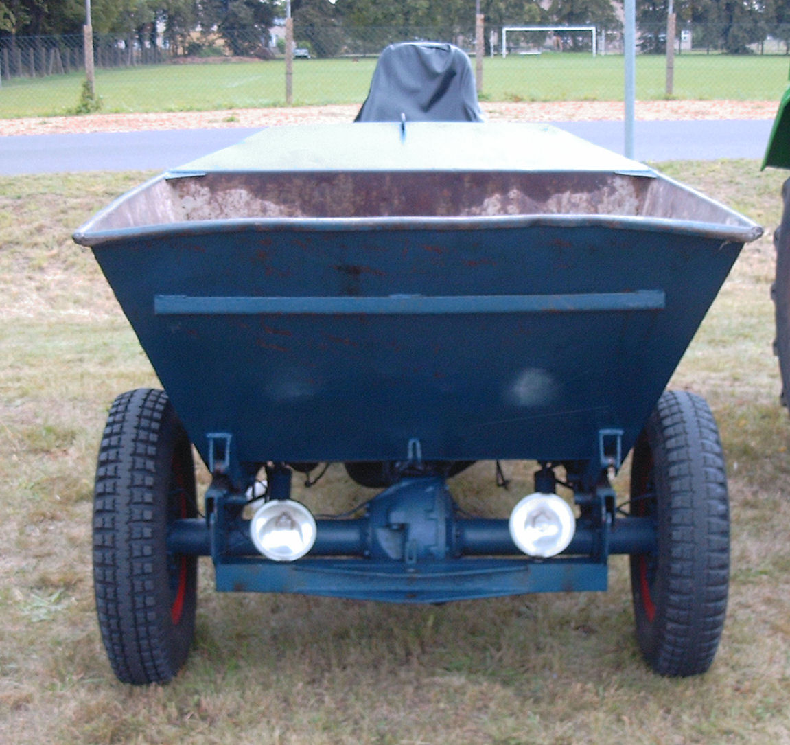 Dumper Picco 1 (umgangssprachlich Dreikantfeile)